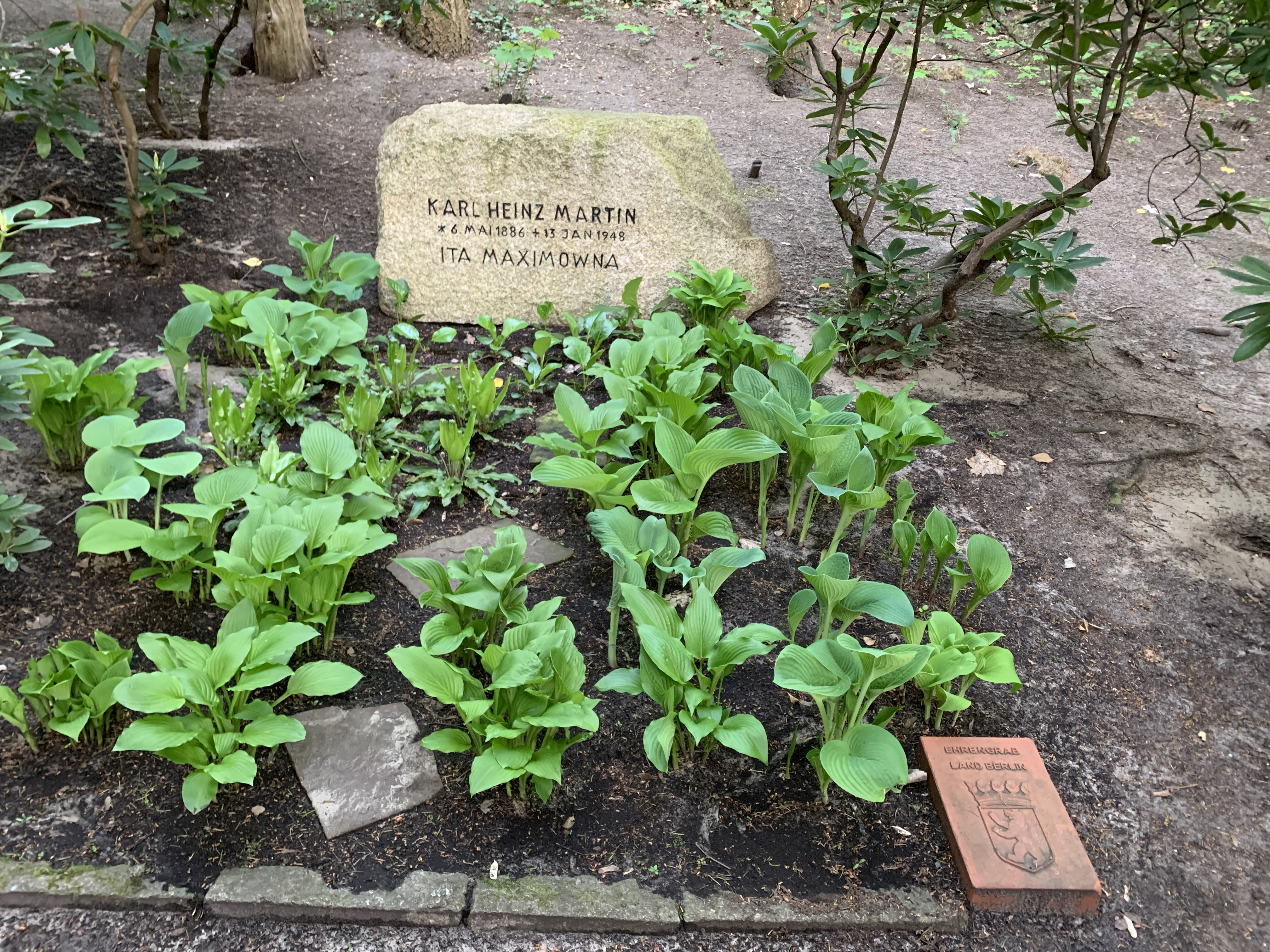 Grab von Ita Maximowna auf dem Friedhof Heerstraße in Berlin-Westend in Mai 2020, mit Gedenkstein der Stadt Berlin